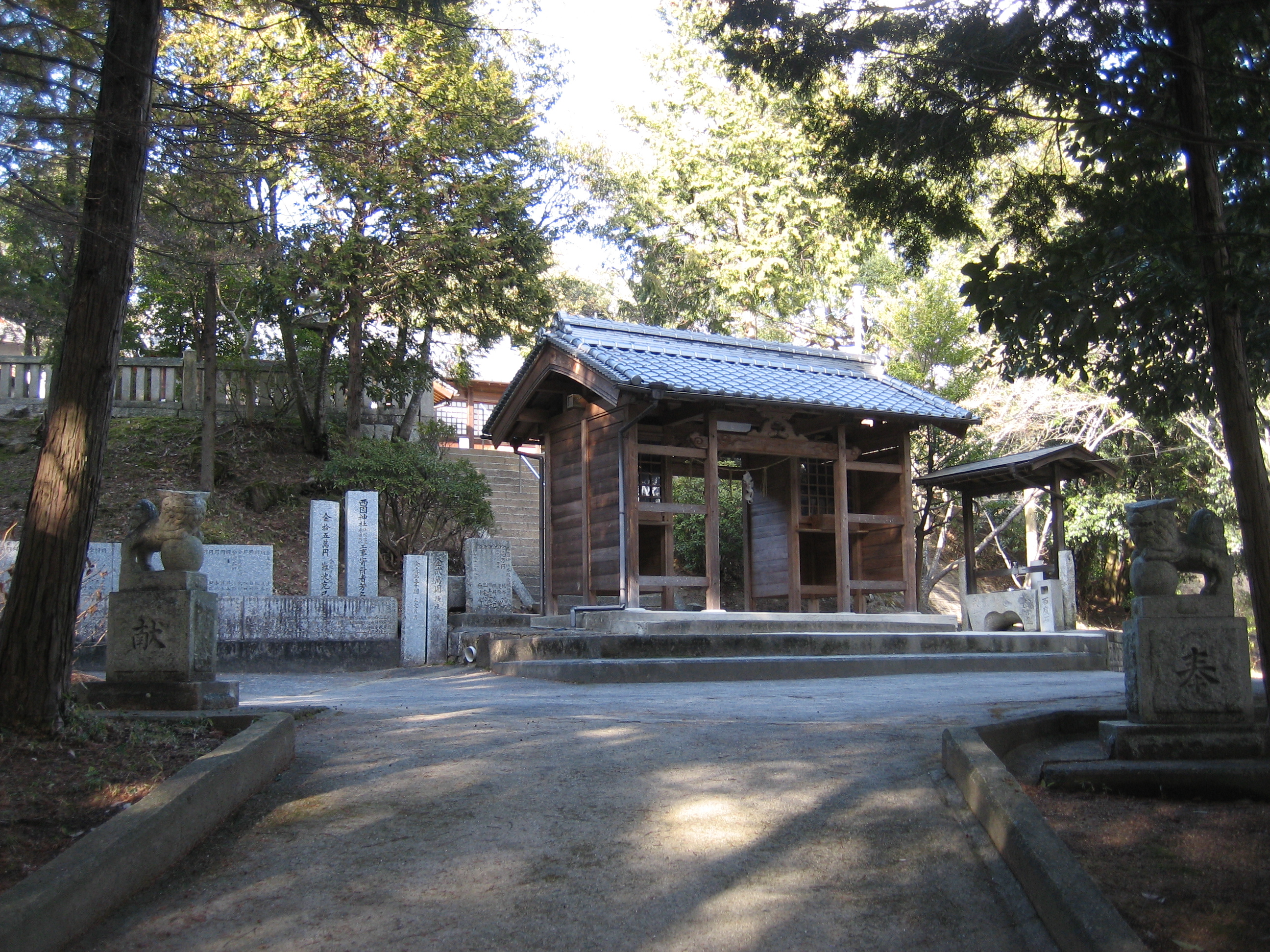 Nj-gaikei